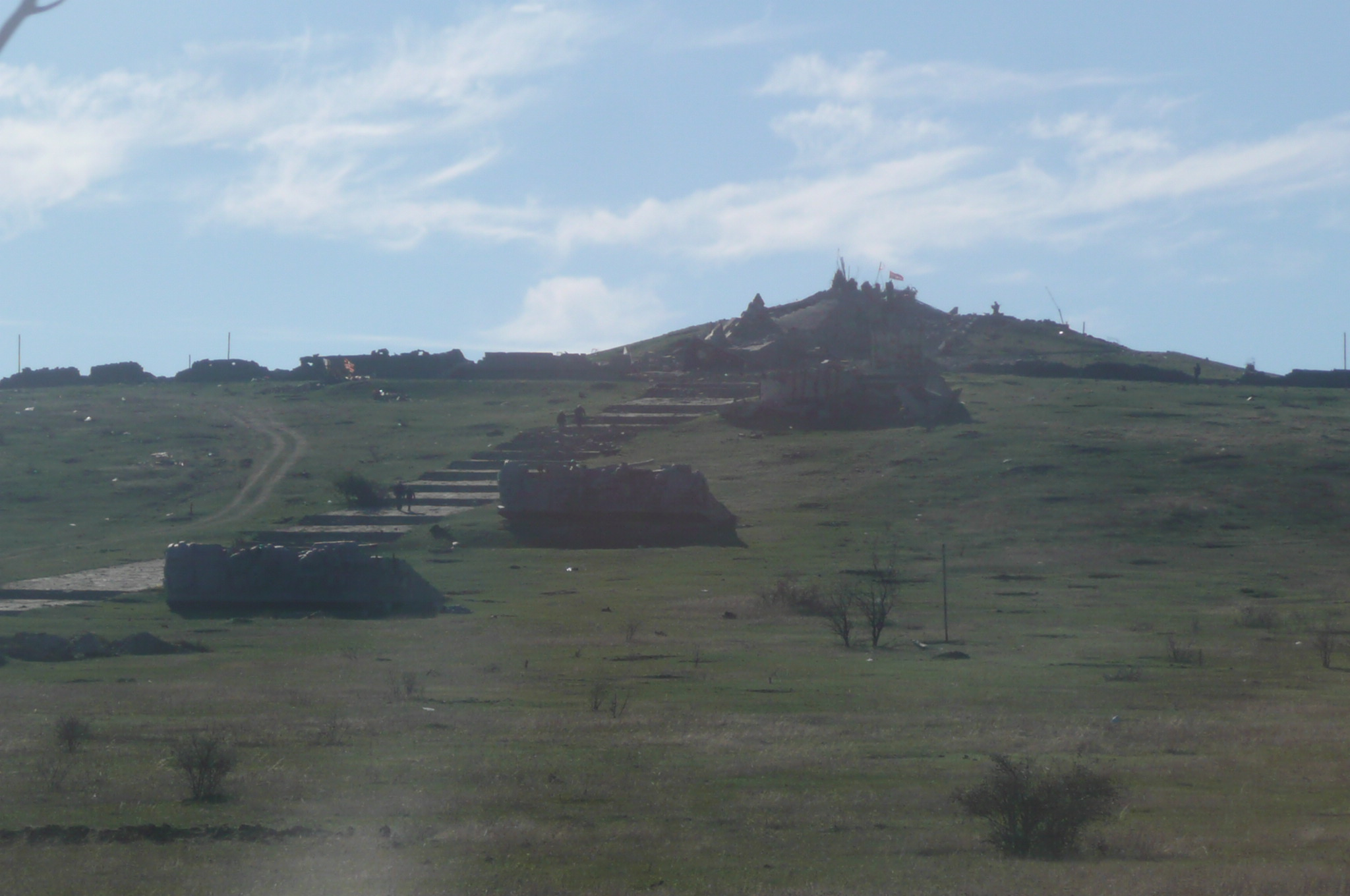 Русский